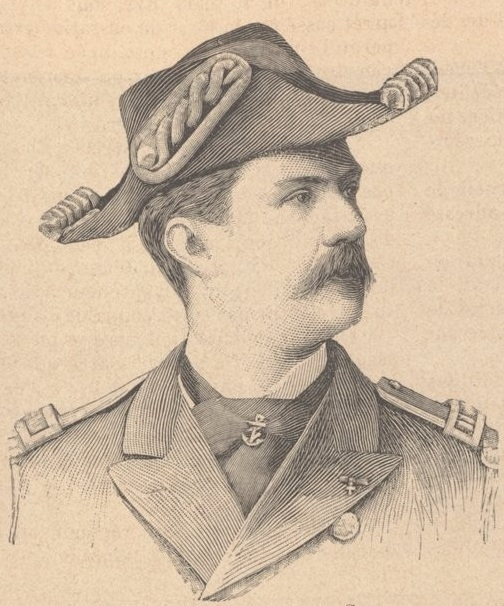 Amiral Saldanha da Gama.